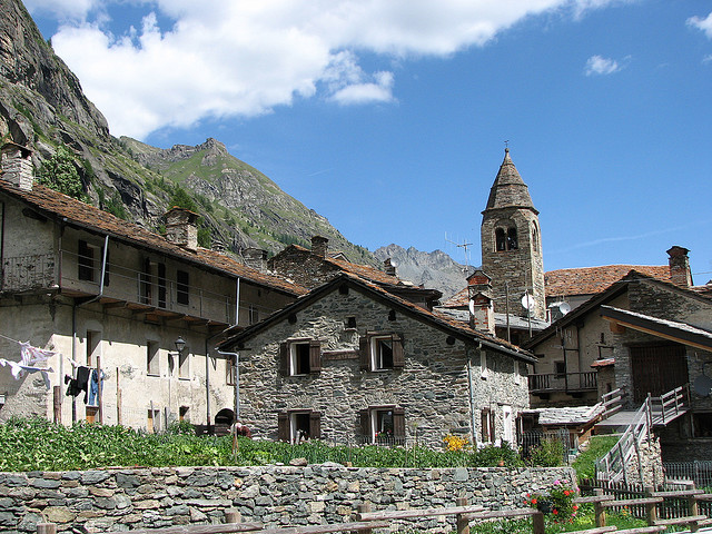 Valgrisenche, Valle d'Aosta, Italia.